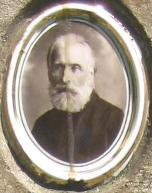 Onofrei Mironovici (1852-1929), ctitorul Bisericii Sf. Dumitru din Stupca